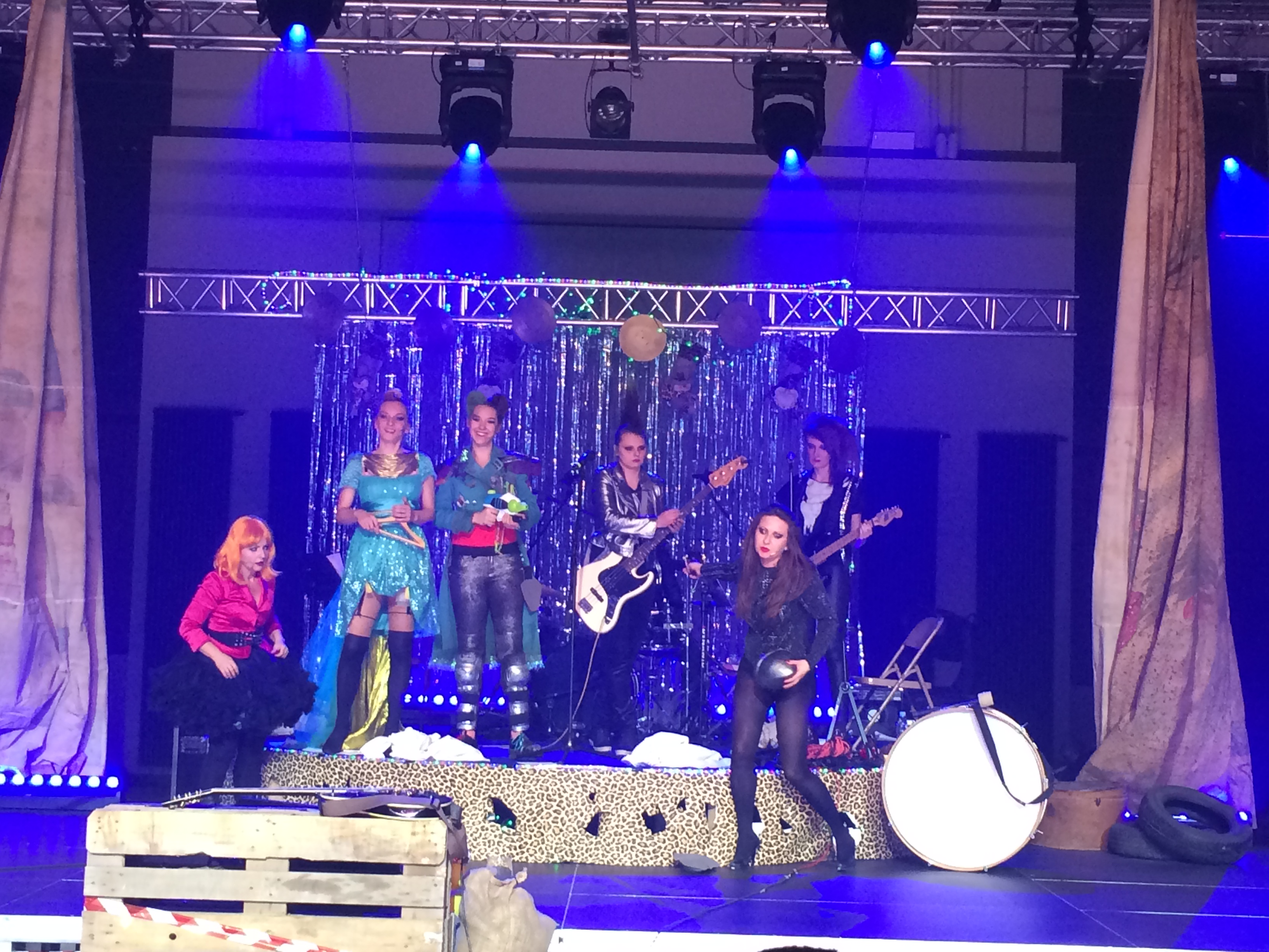 Pożar w burdelu w trakcie przedstawienia Szpital Nieświętej Rodziny (odc. 33) w Teatrze Nowym